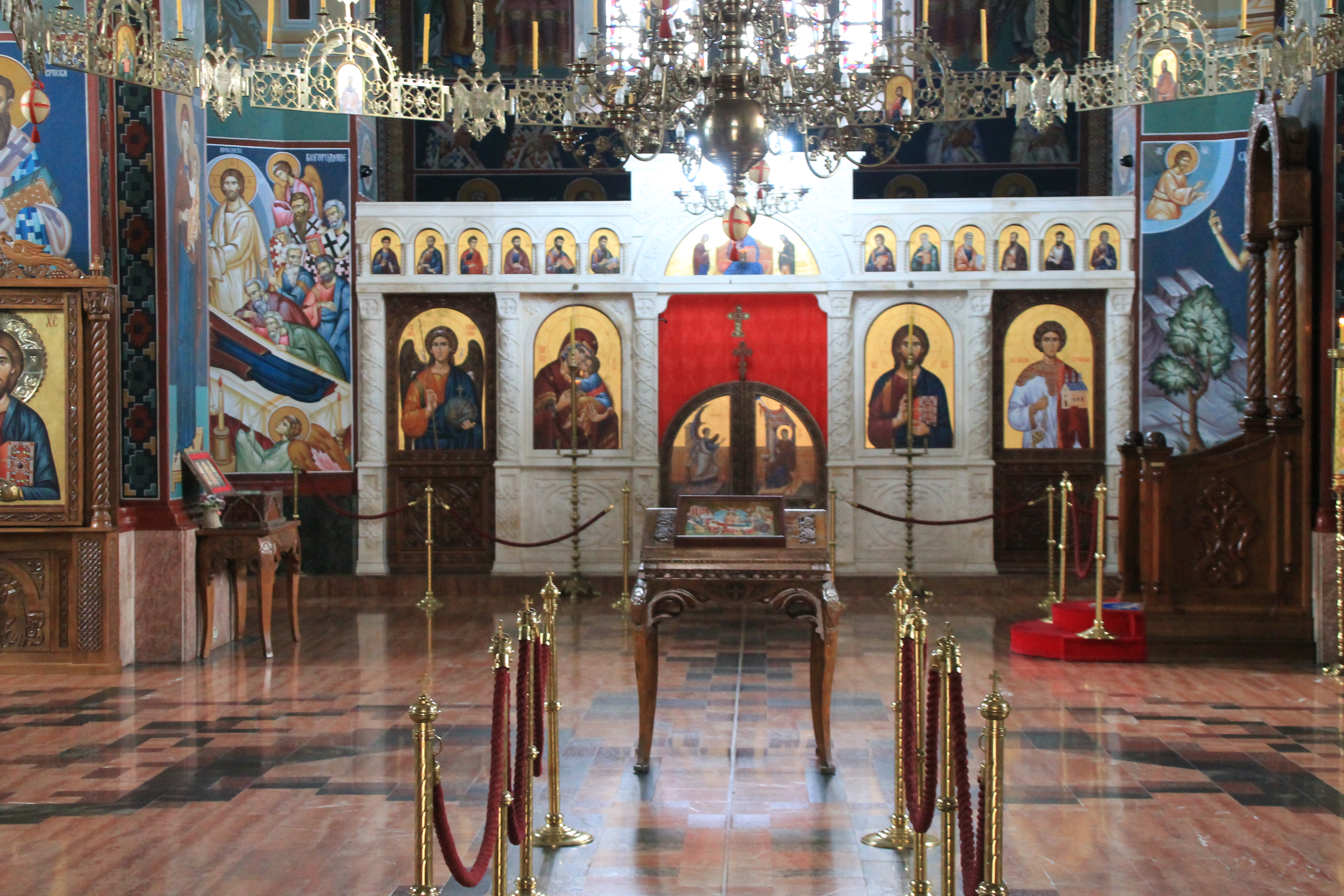 Saborna crkva u Kragujevcu